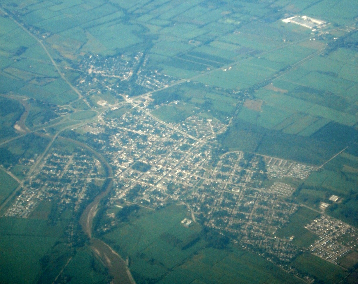 Famaillá, Tucumán - Vista aérea/aerial view